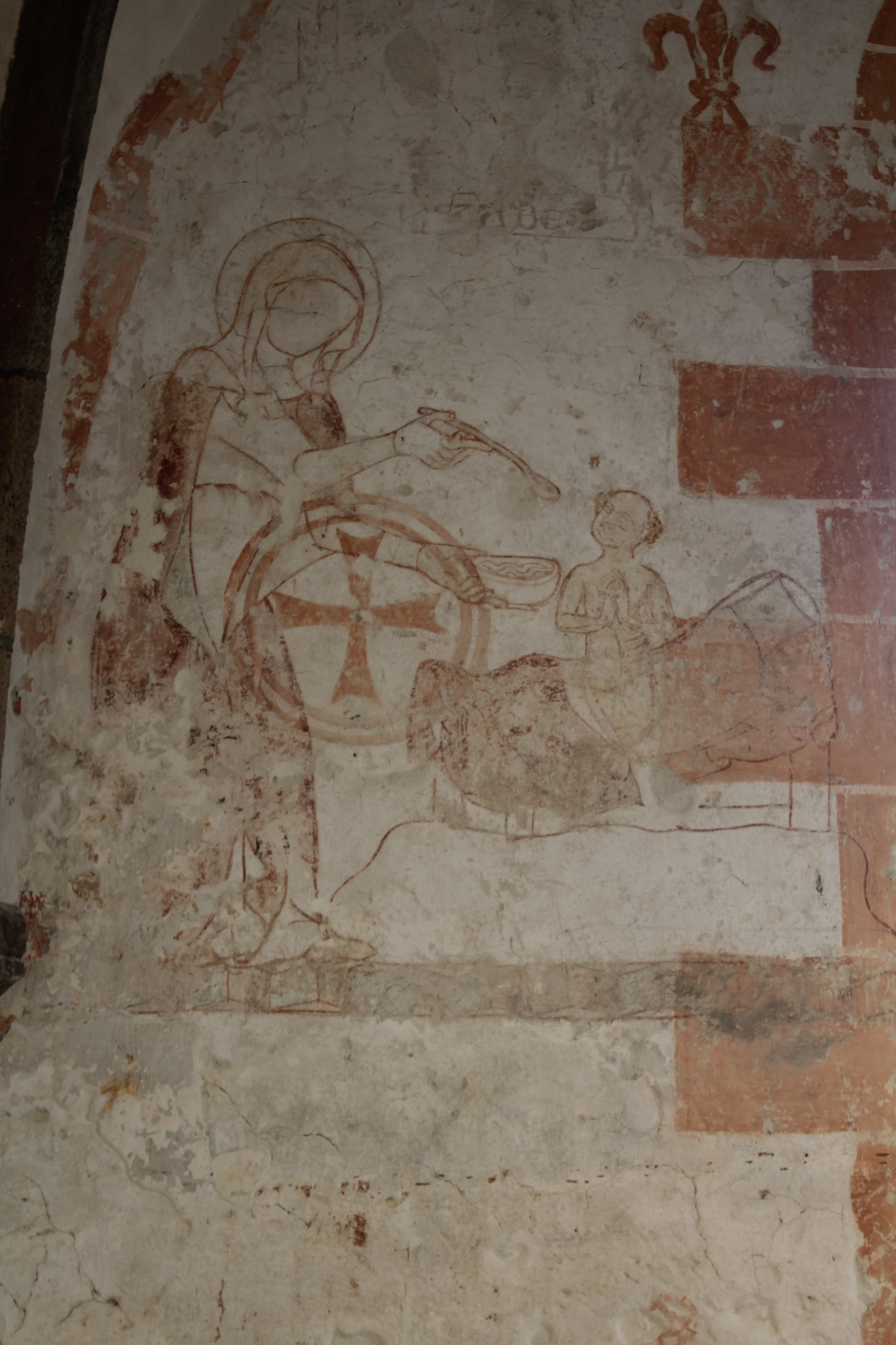 Evangelische Kirche Ober-Ohmen, Mücke, Vogelsbergkreis, Hessen, Deutschland